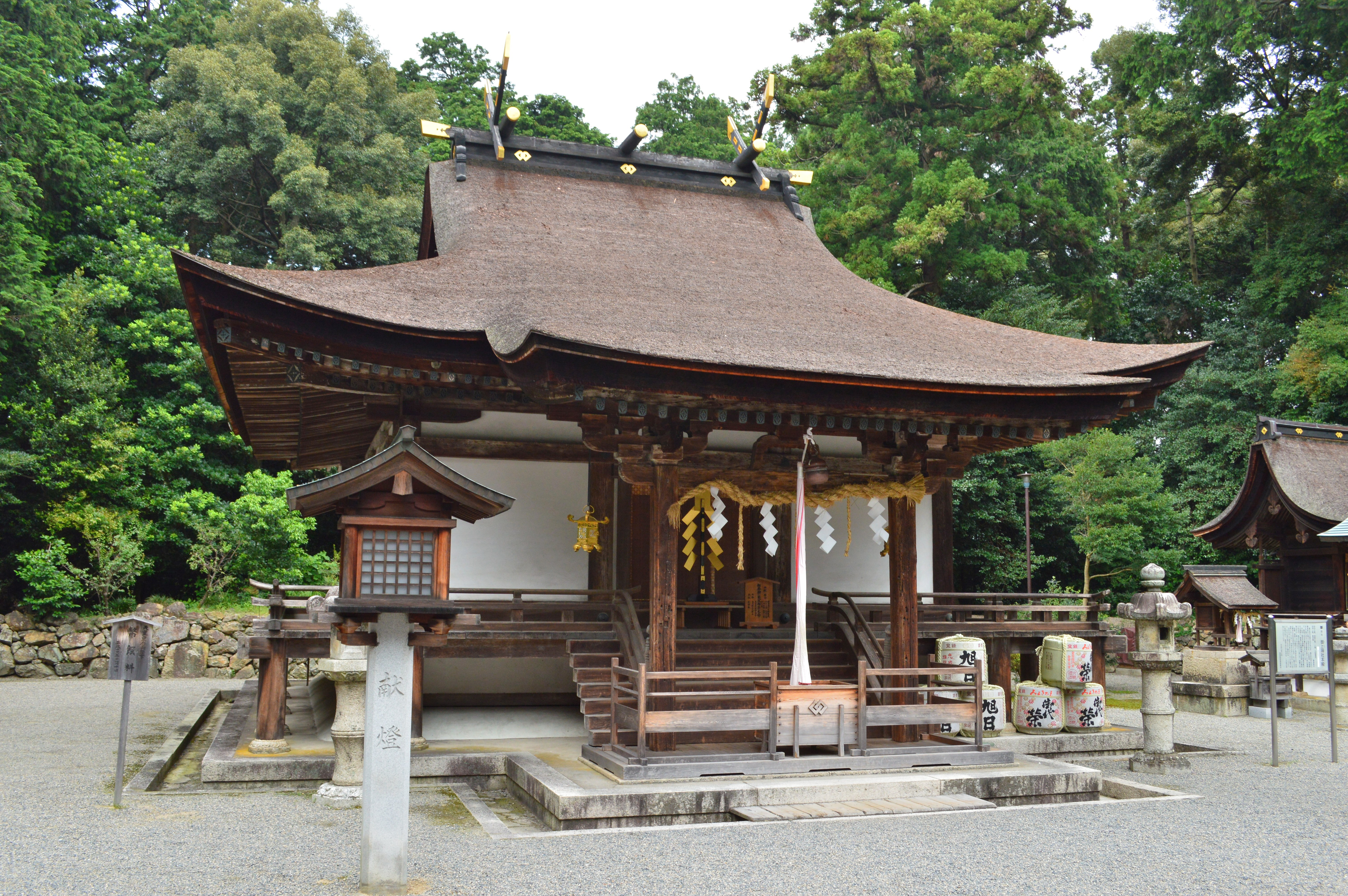 御上神社 本殿